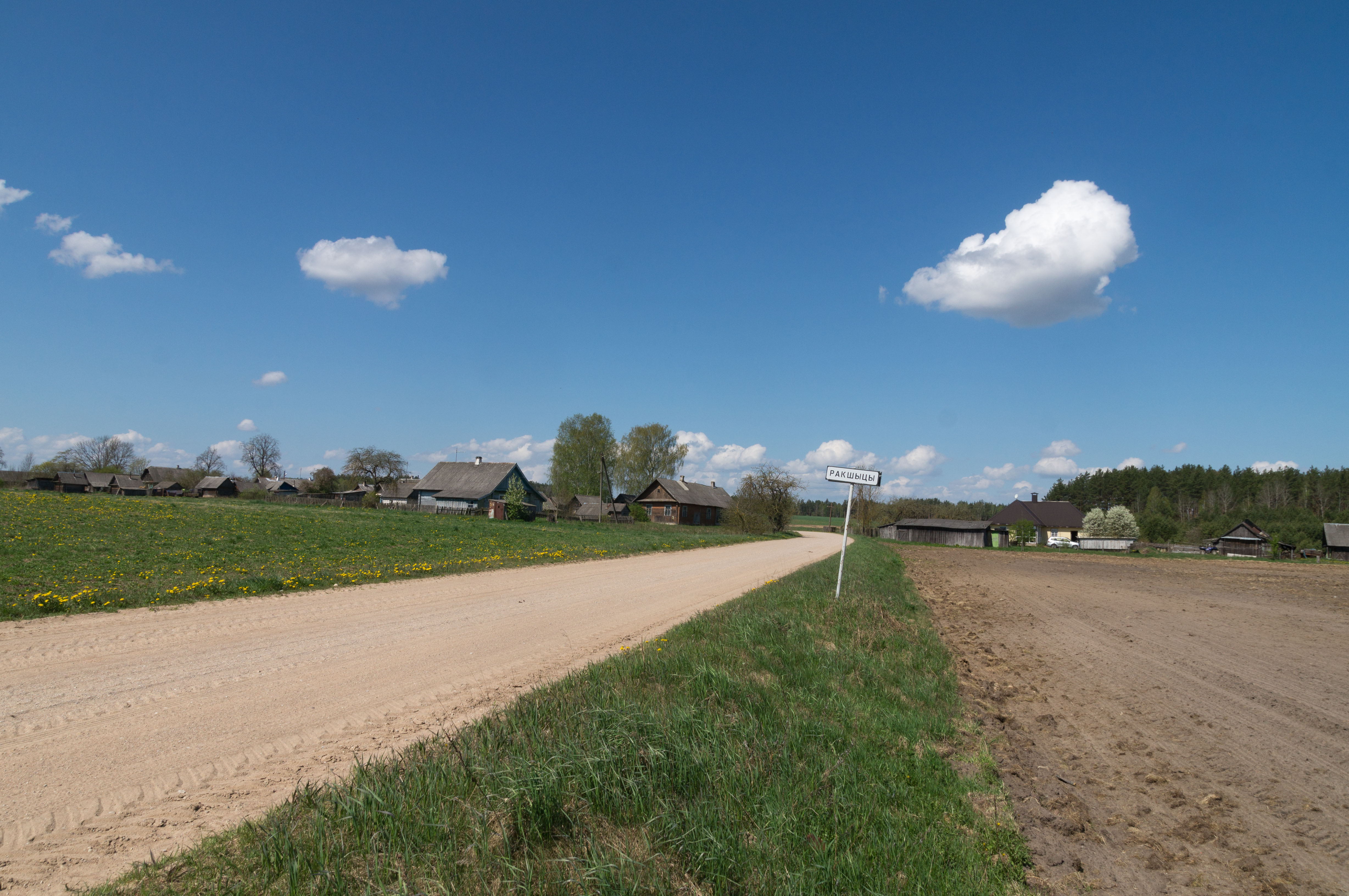 Вёска Ракшыцы